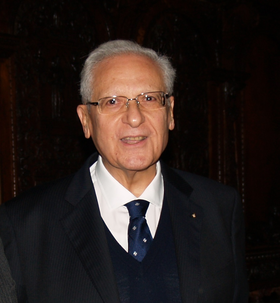 Foto personale